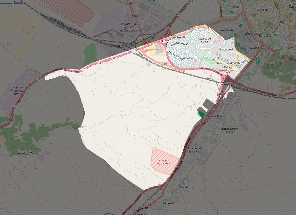 Distrito Sur de Zaragoza creado en 2018.